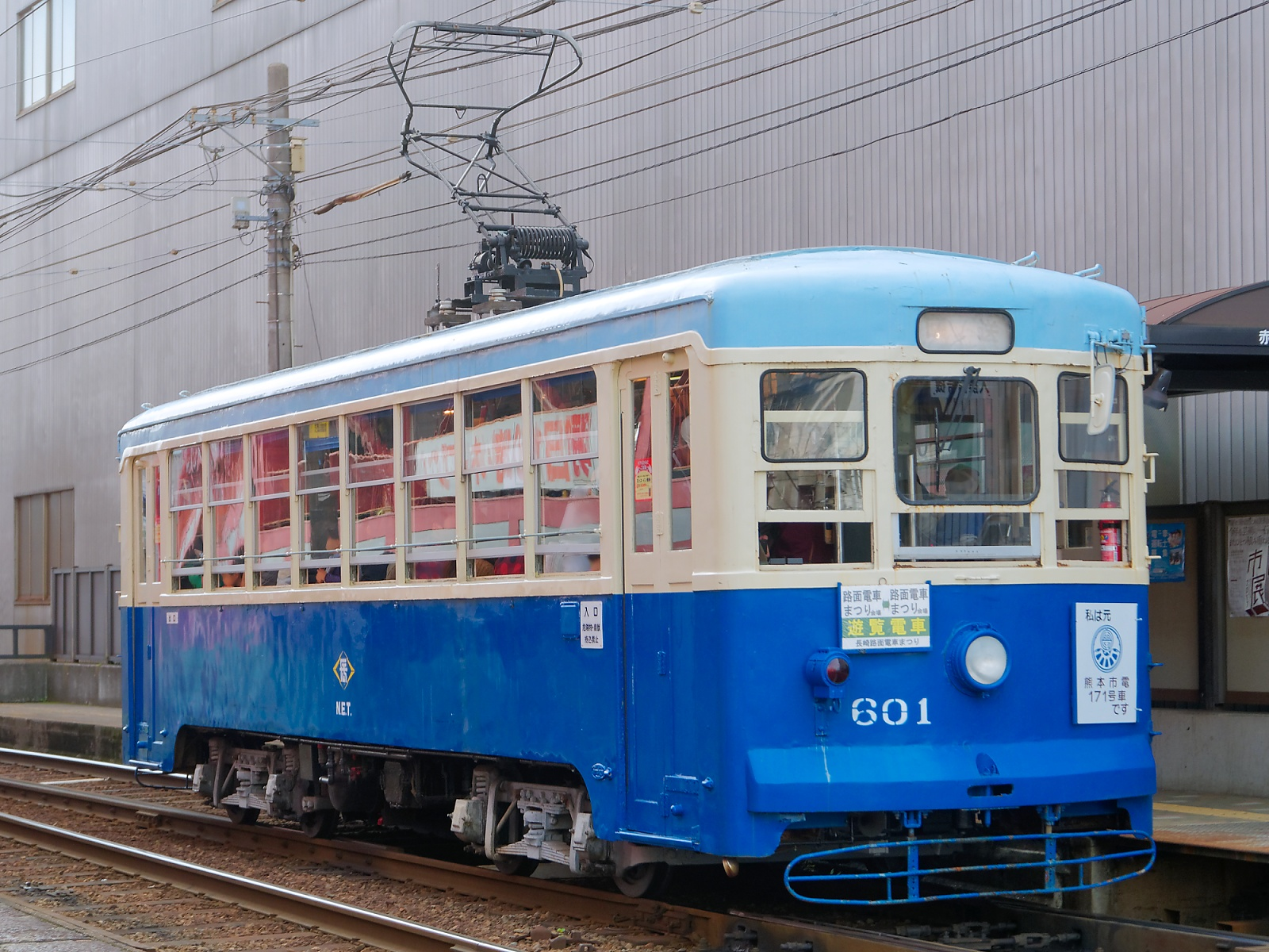 路面まつりの遊覧電車運用に就く長崎電気軌道の600形電車601号。元熊本市交通局（熊本市電）170形171号で、塗装は熊本市電ツーマン車塗装に塗られている。